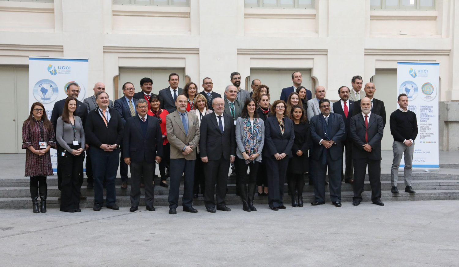 La portavoz del Gobierno municipal y secretaria general de la Unión de Ciudades Capitales Iberoamericanas (UCCI), Rita Maestre, ha participado esta mañana en la inauguración del XII Encuentro de Directores/as de Relaciones Internacionales y Coordinadores/as de la Unión de Ciudades Capitales Iberoamericanas (UCCI), que ha tenido lugar en el Palacio de Cibeles.